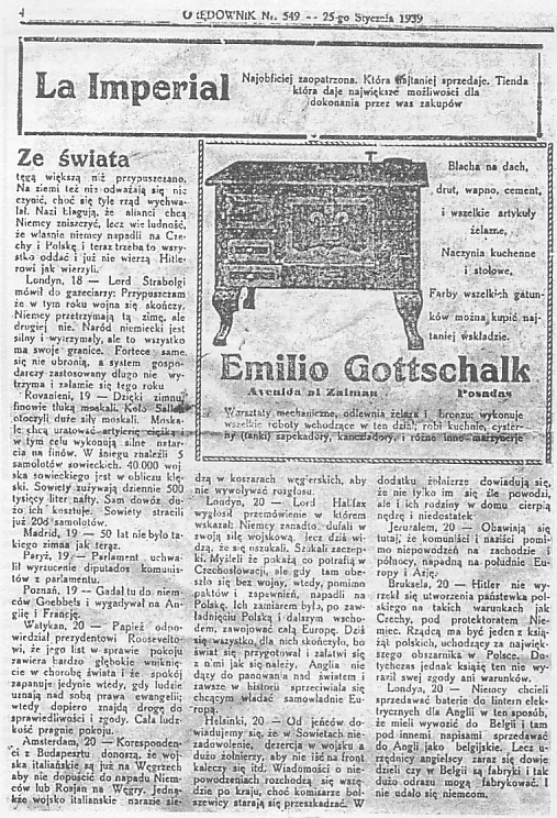 Página 4 del periódico Oredownik (Procurador Polaco) Nº 549 de 1939. Director y administrador: Juan Czajkowski (Jezierzany, Polonia, 1896 + Posadas, Argentina, 1970).